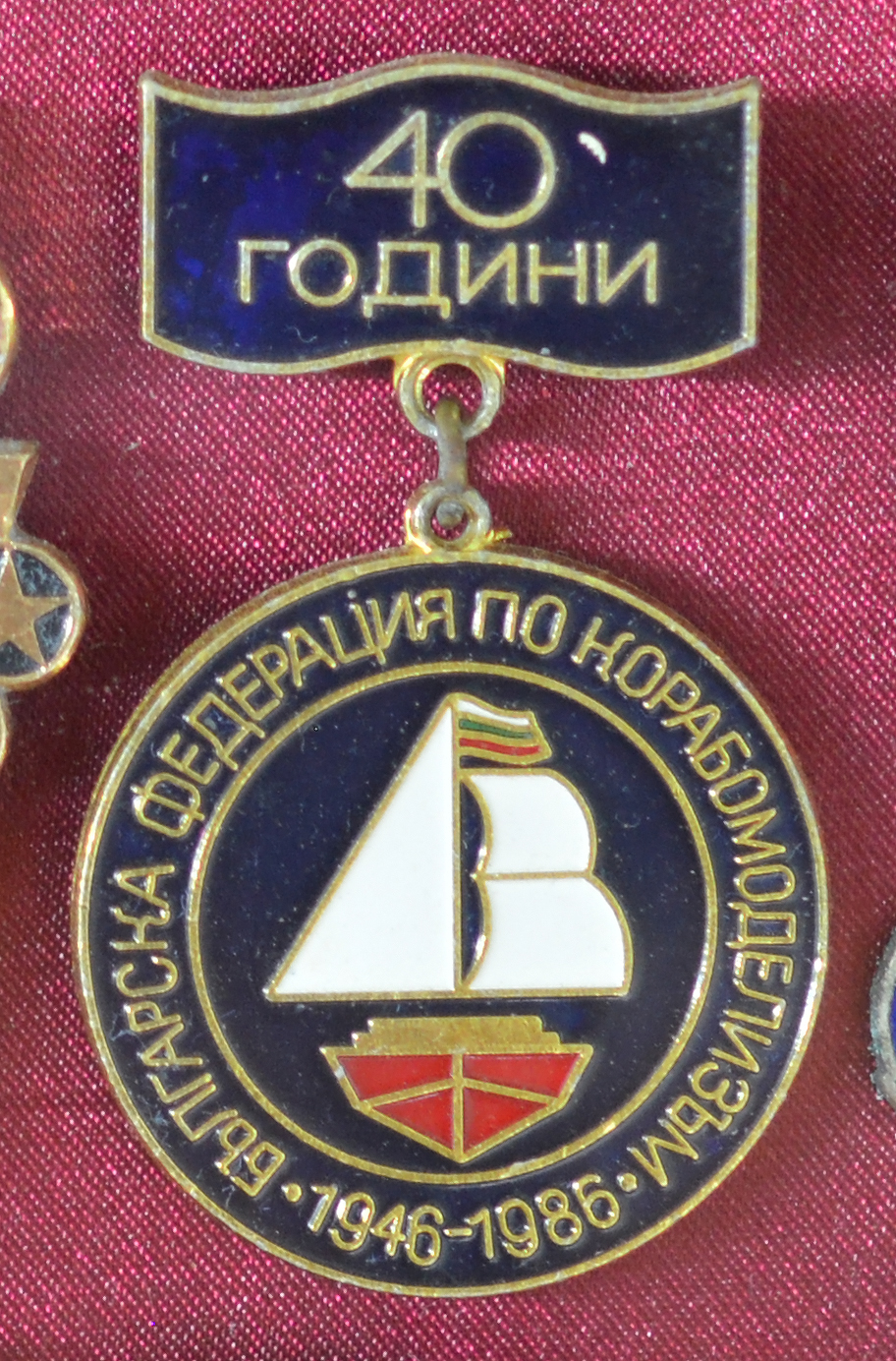 Медал отбелязващ 40-годишнината от създаването на Българската федерация по корабомоделизъм (1946-1986). Връчен на Христо Стефанов Боевски за заслуги като инструктор по корабомоделизъм, Ботевград.